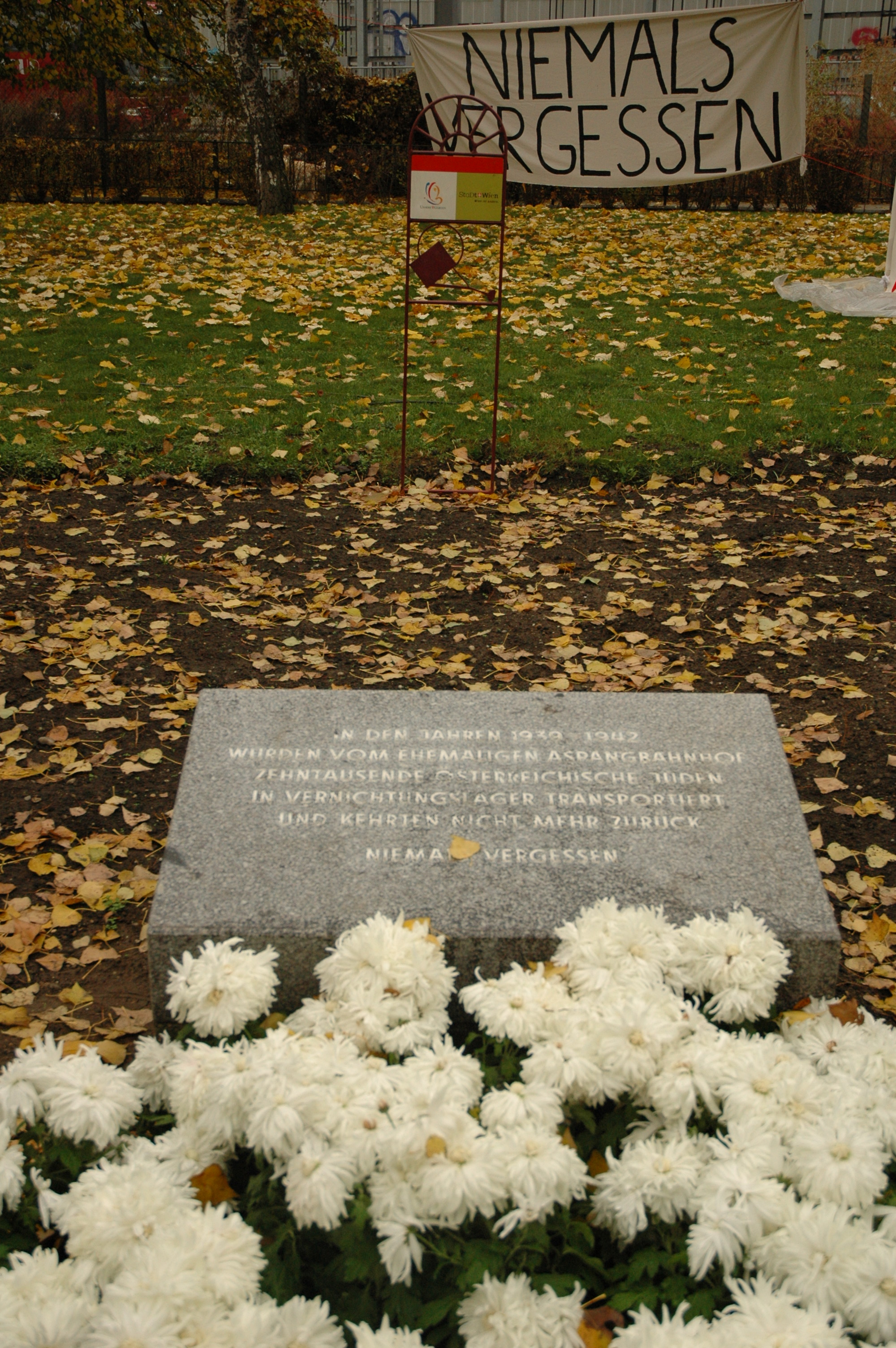 Gedenkstein am ehemaligen Aspangbahnhof in Wien-Landstraße mit Transparent im Hintergrund anlässlich einer Gedenkveranstaltung